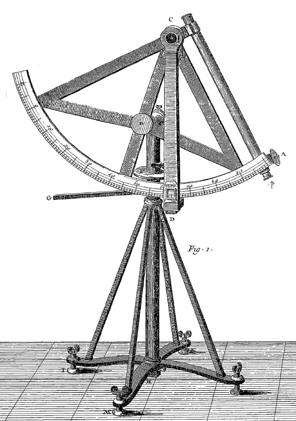 Quart de cercle mobile à une lunette avec micromètre.